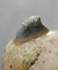 Mauro Mariani, Piccolo mollusco d'acqua dolce Ancylus fluviatilis